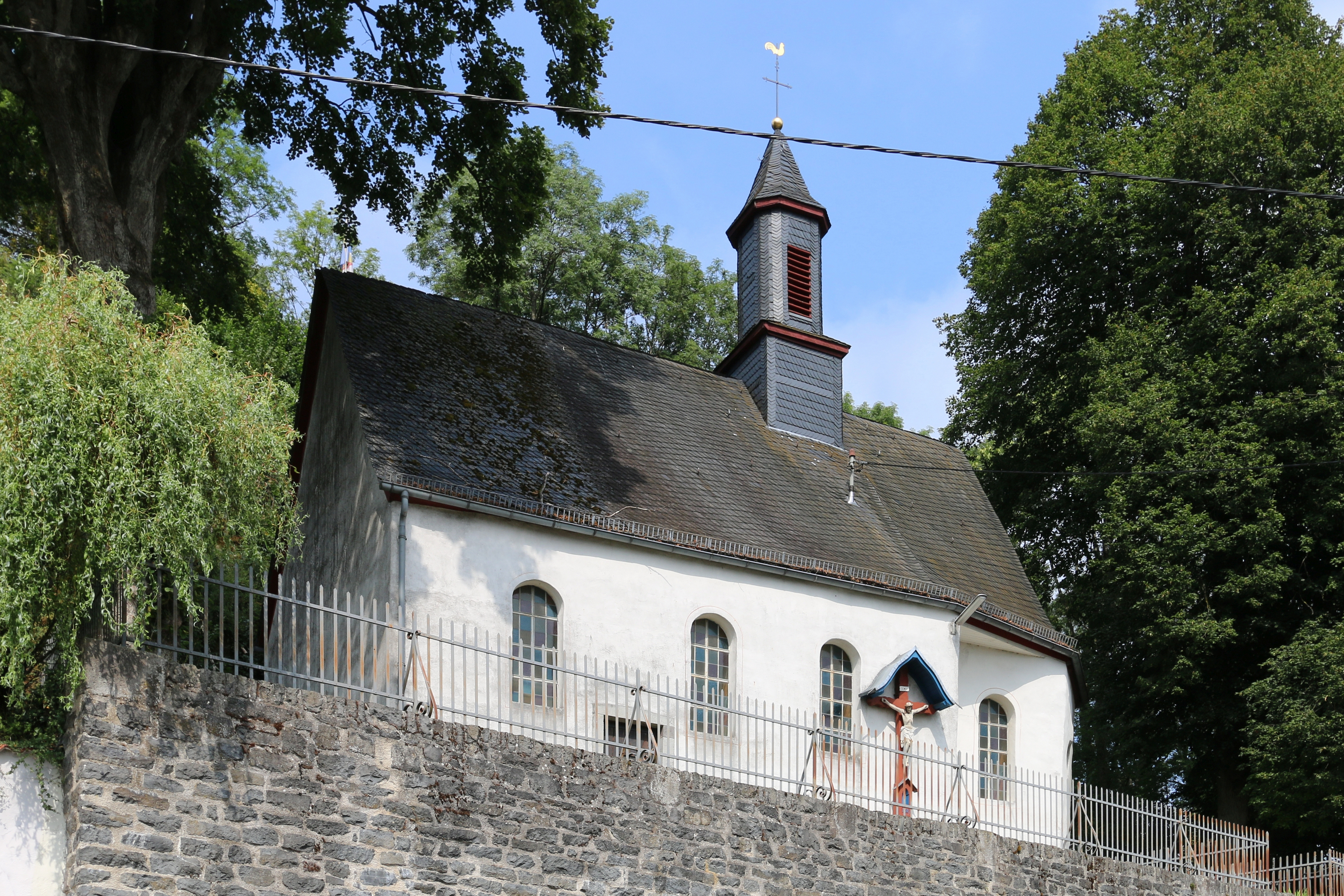 Weltersburg, Westerwaldkreis: Katholische Kirche This is a photograph of an architectural monument.It is on the list of cultural monuments of Weltersburg